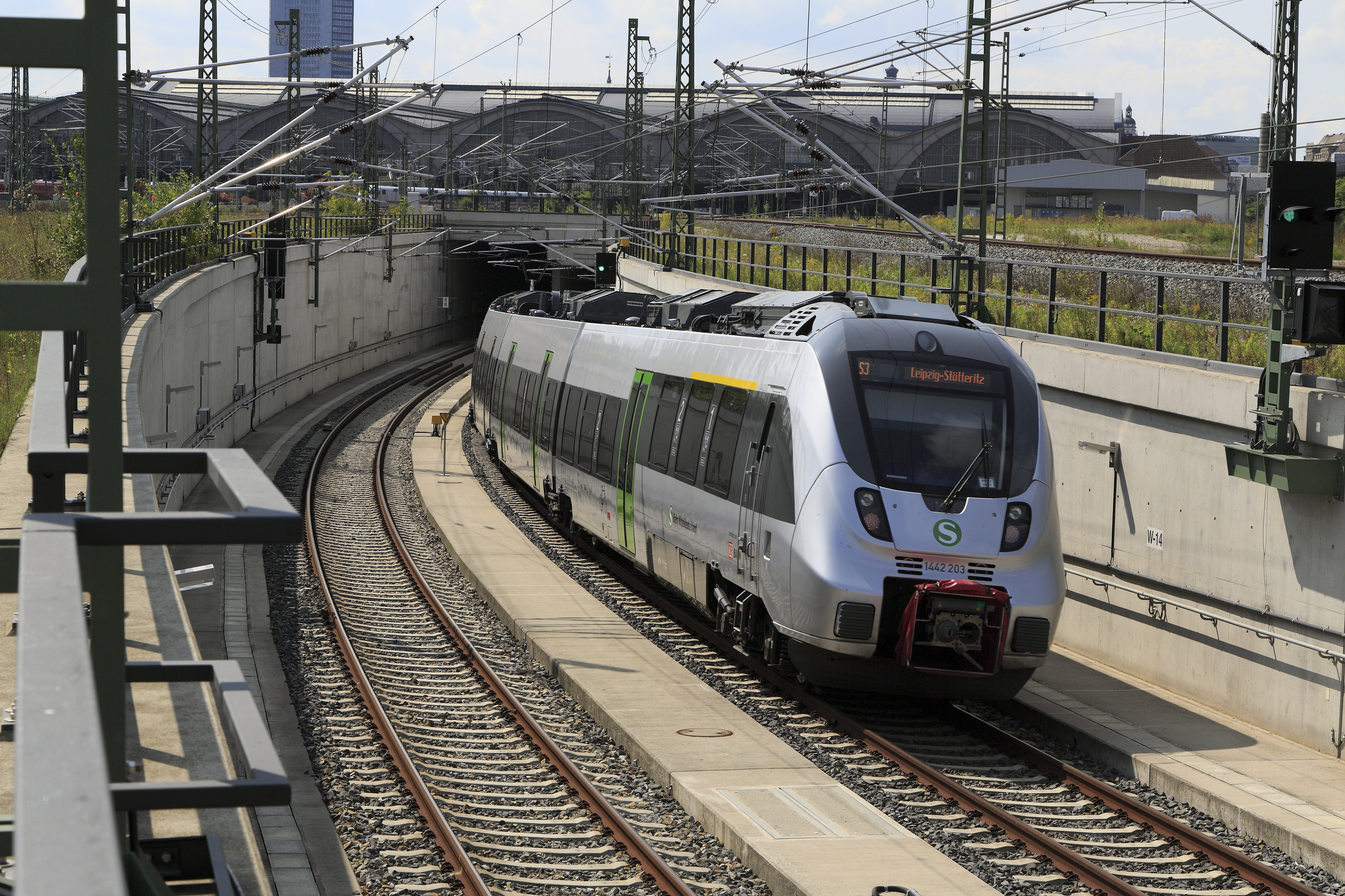 Eine der vierteiligen Einheiten auf der Linie S3 von Halle über Schkeuditz nach Stötteritz am Tunnelmund West.